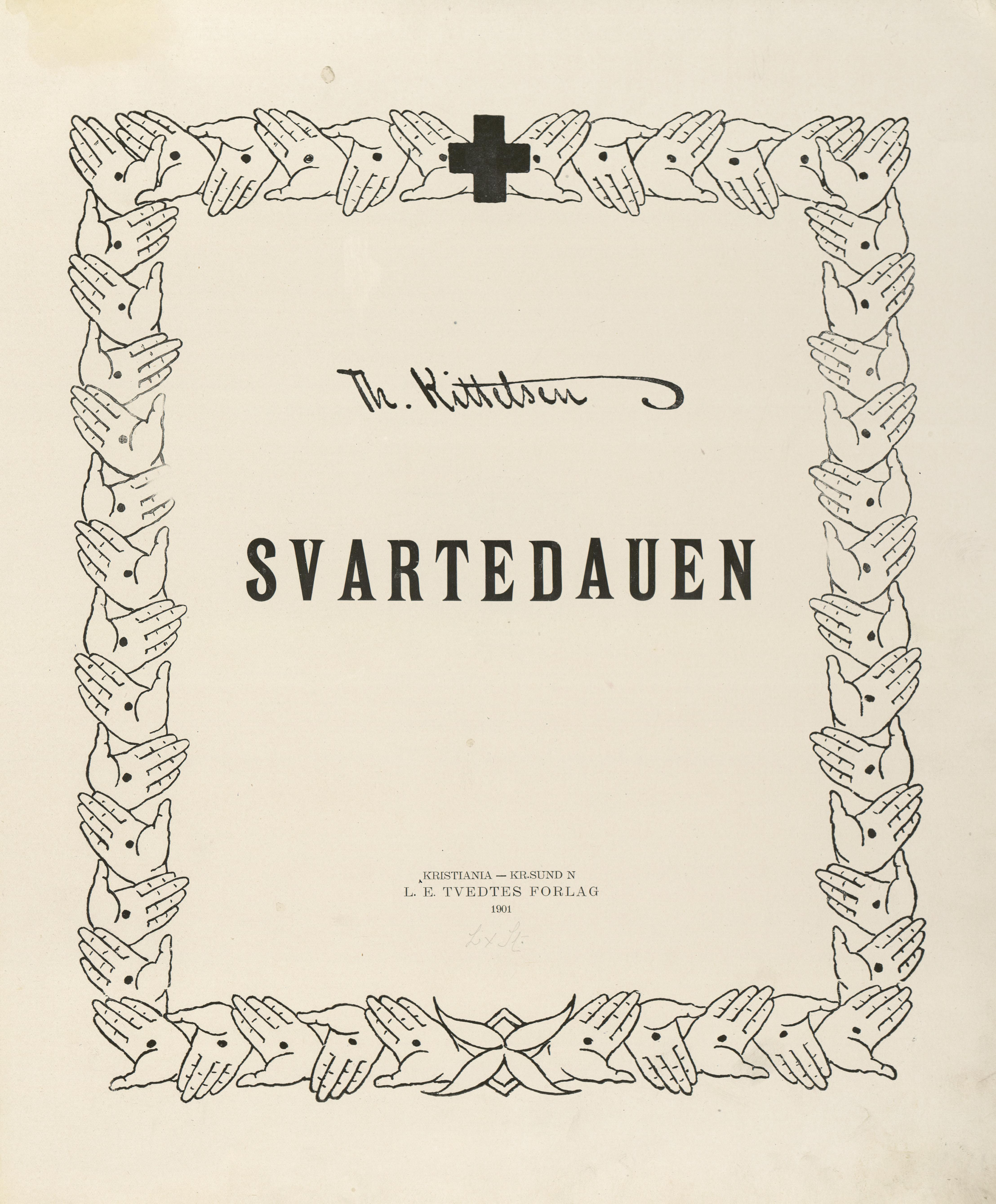 Illustrasjon hentet fra boken Svartedauen av Kittelsen, Th. og utgitt av L.E. Tvedte (no, 1901)